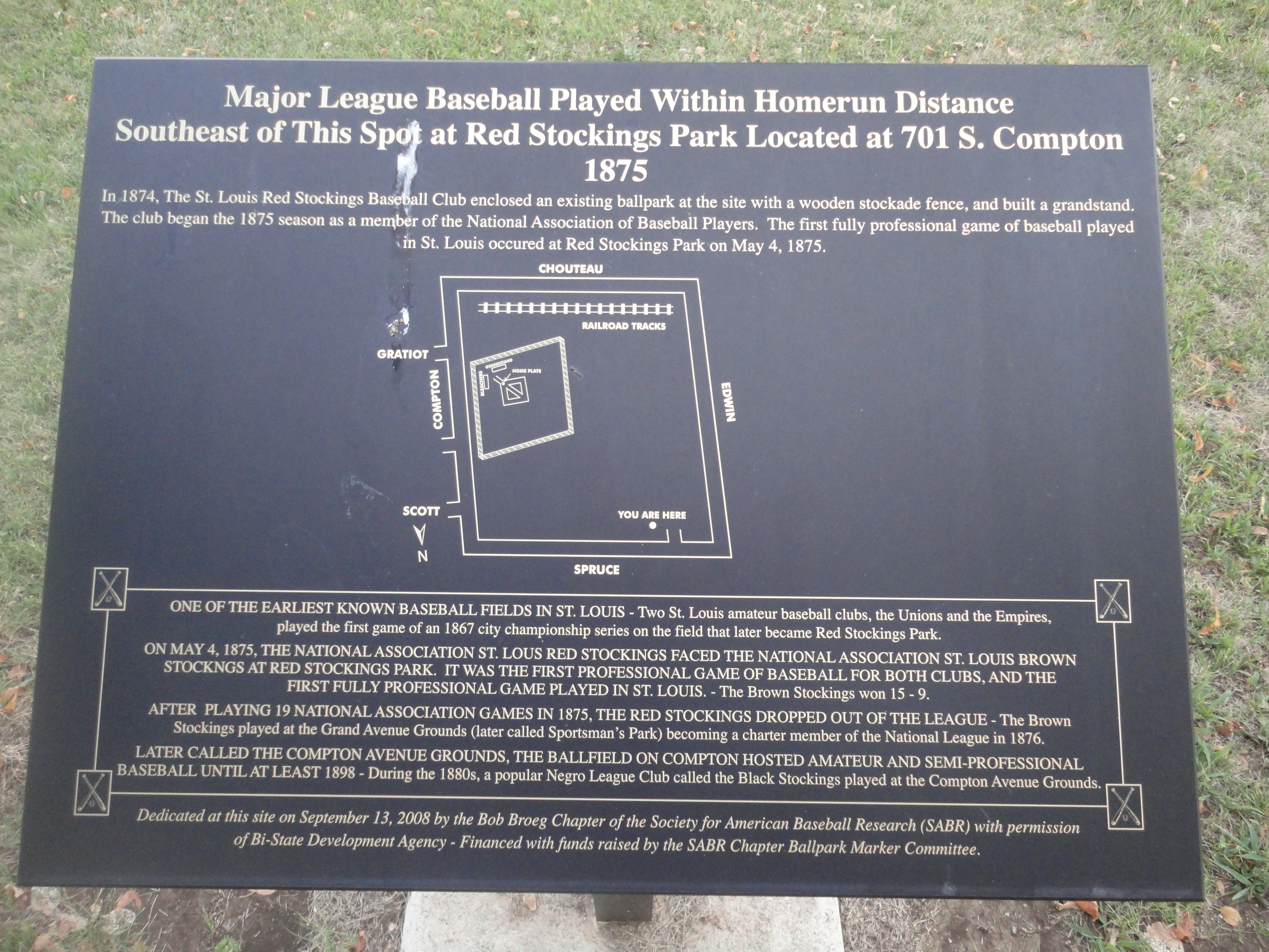 Red Stockings Park